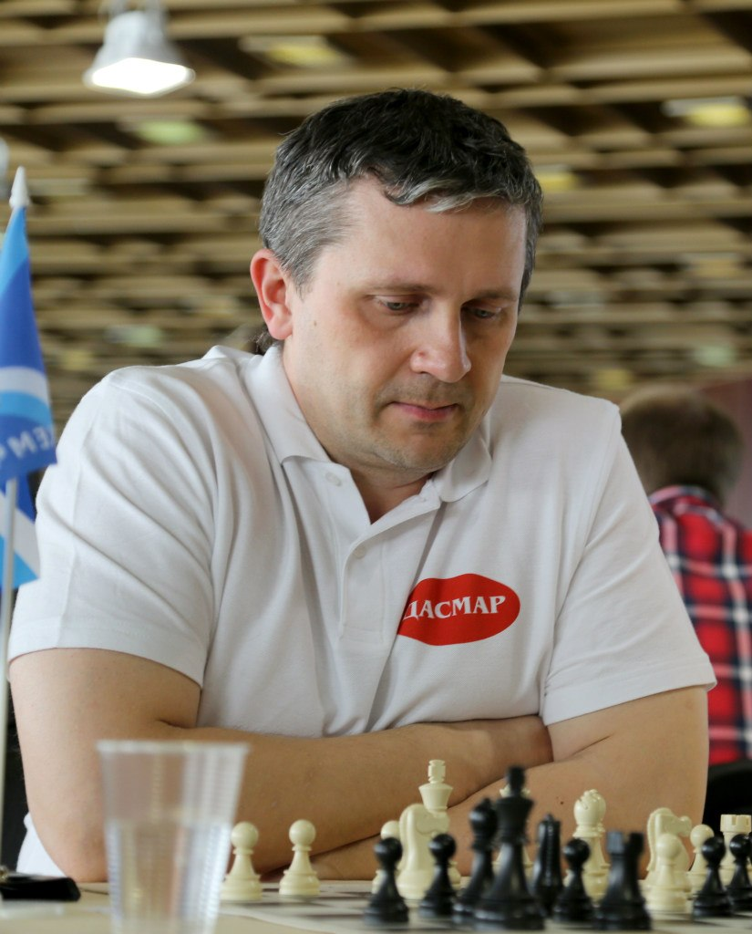 Гроссмейстер Петр Киряков